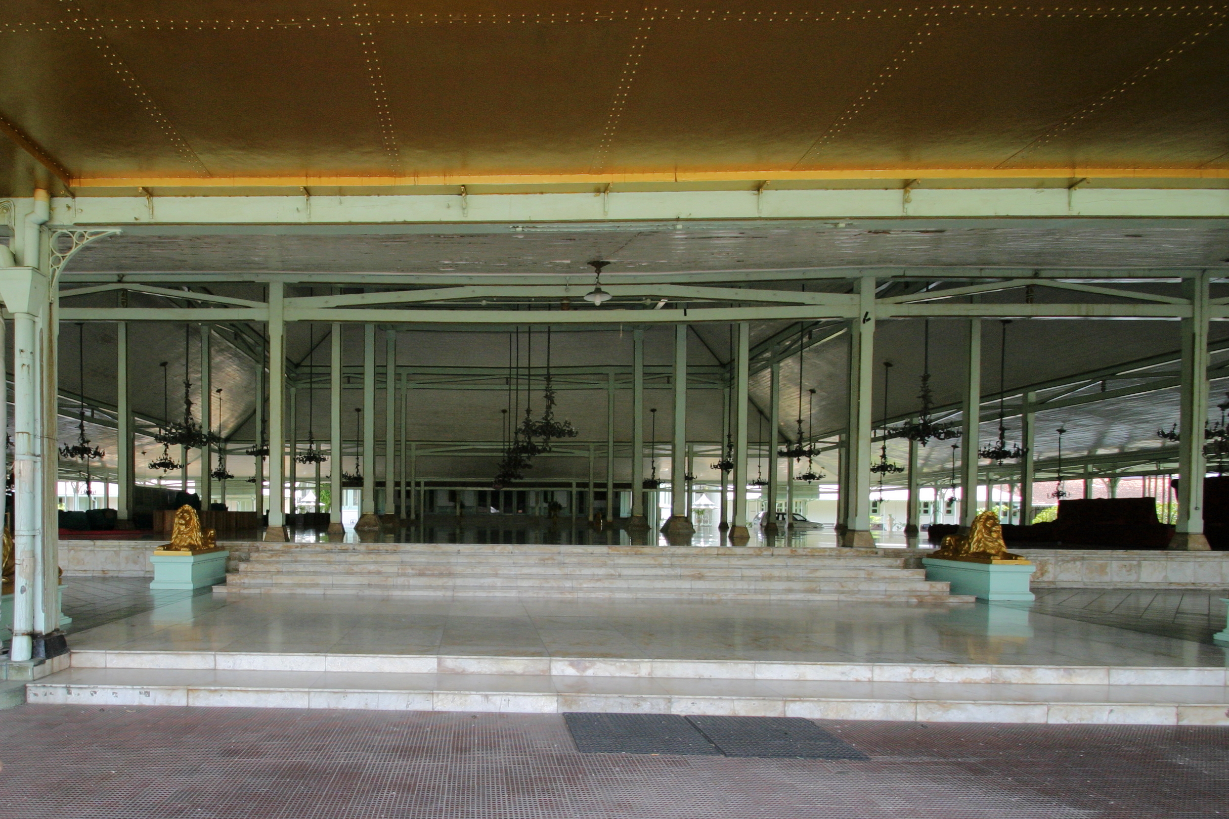 プンドポの広間の正面入口より北側方向。大理石の床面は土足厳禁。